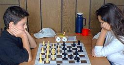 David Baramidze spielt in Runde 9 gegen Oksana Sarana, Dortmunder Sparkassen Chess Meeting 2000 Open A.